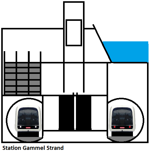 Schematische indeling metrostation Gammel Strand Kopenhagen gezien uit het westen